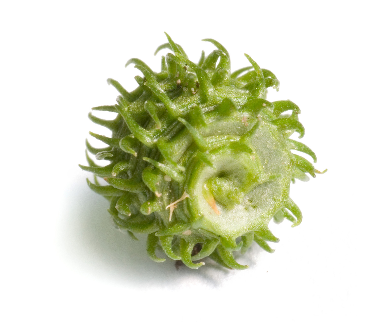 Medicago arabica